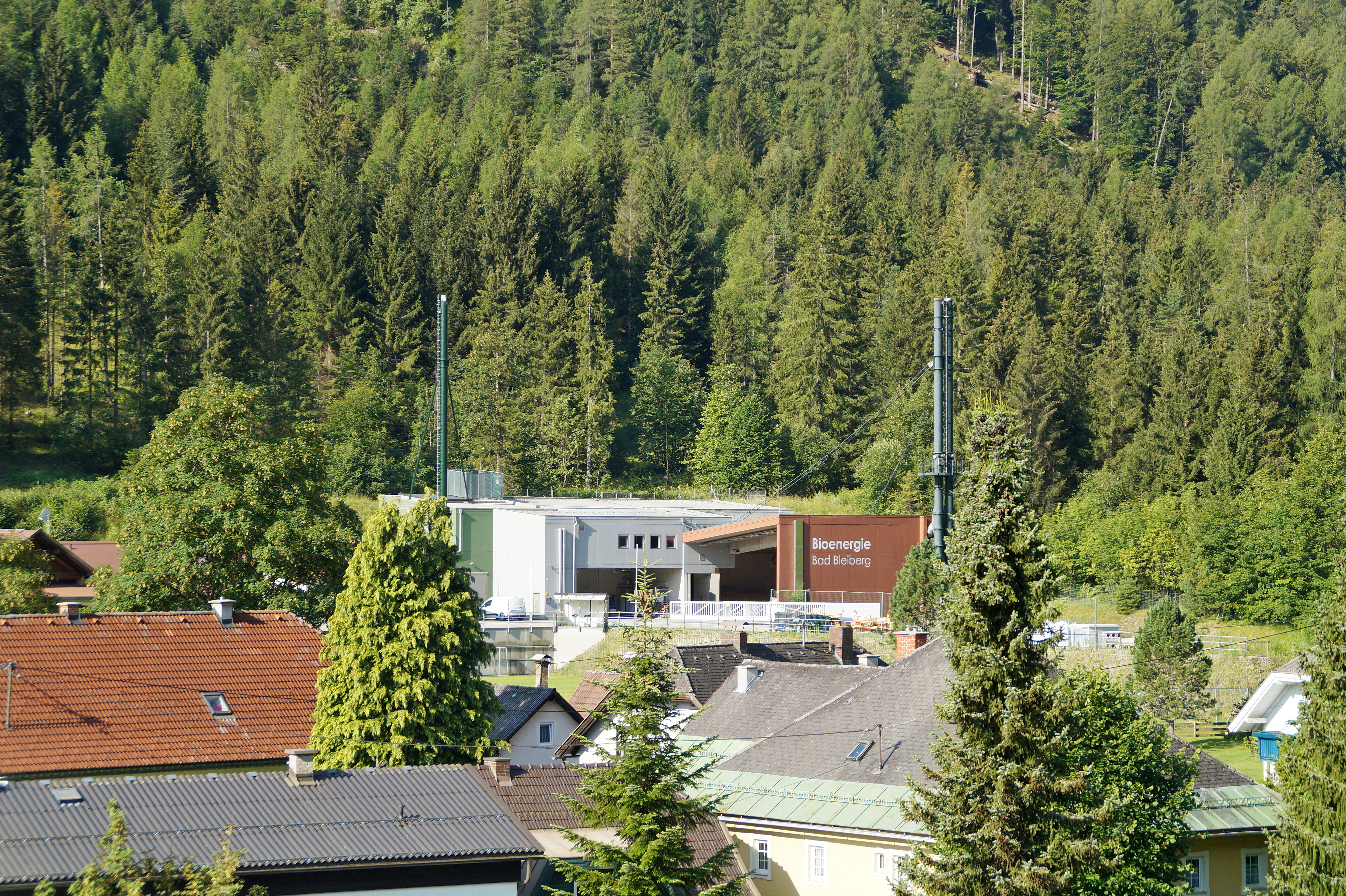 Das Bioenergie-Nahheizwerk im Thermenbezirk in Bad Bleiberg, Kärneten, Österreich